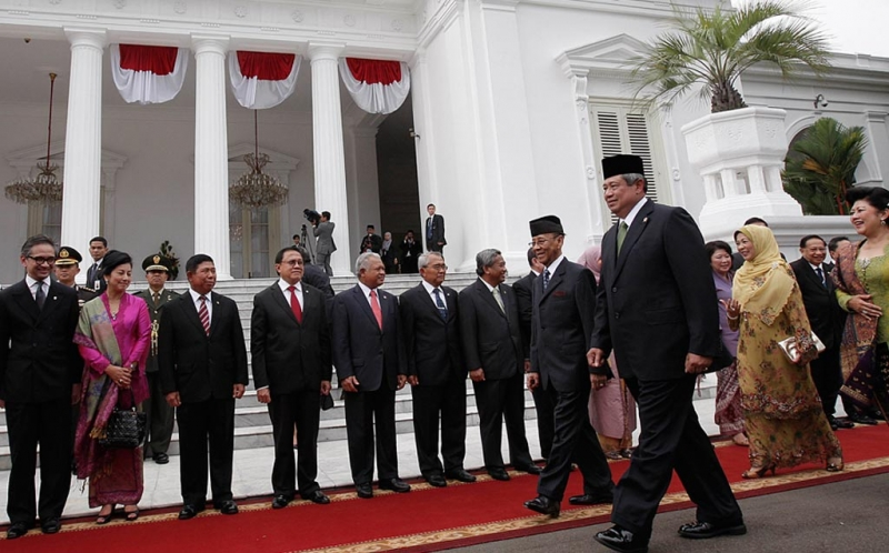 imej Istana Negara Tamu dari raja malaysia di pintu depan istana merdeka